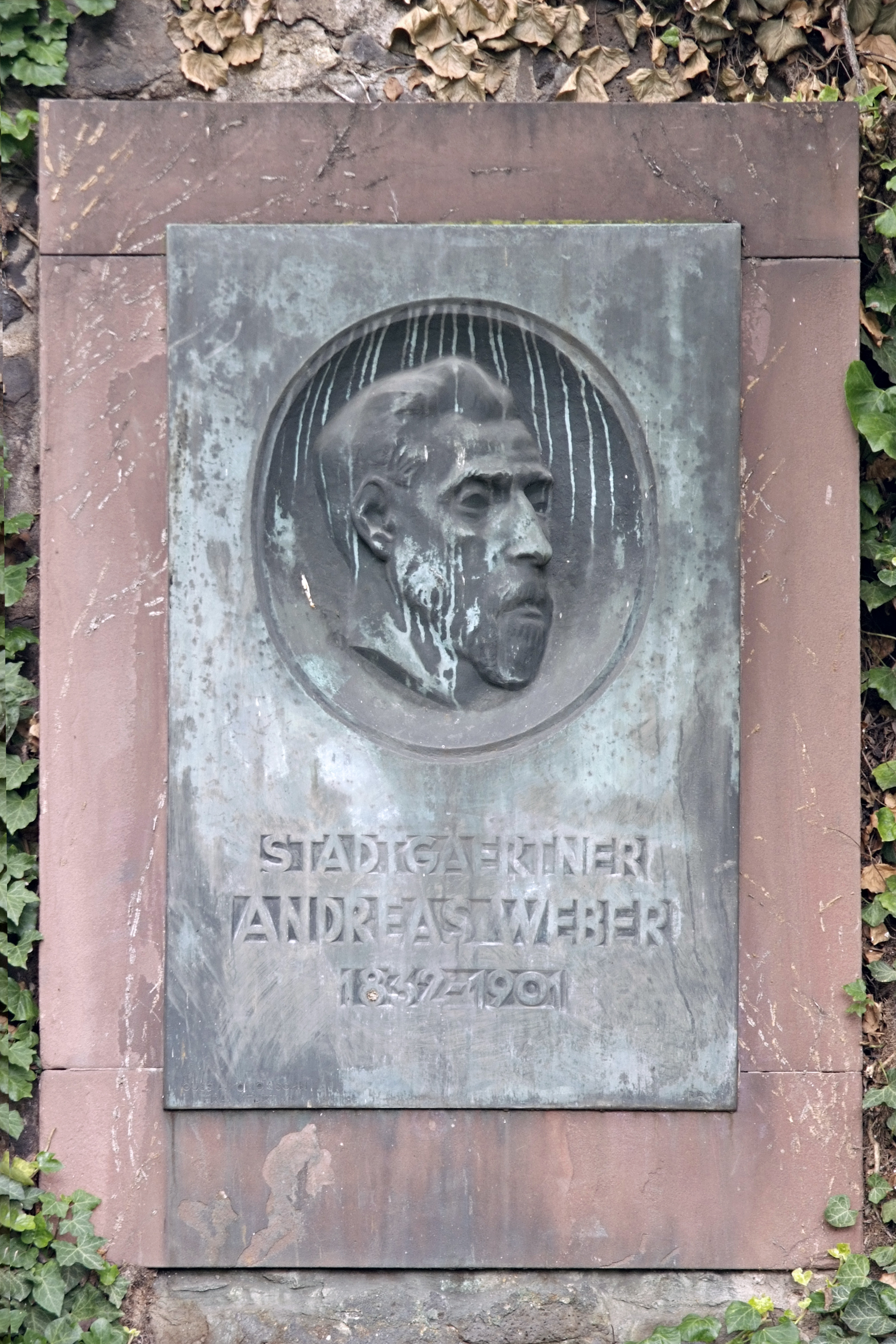 Gedenktafel für den Gartenbauer Andreas Weber am Nizzaufer in Frankfurt am Main